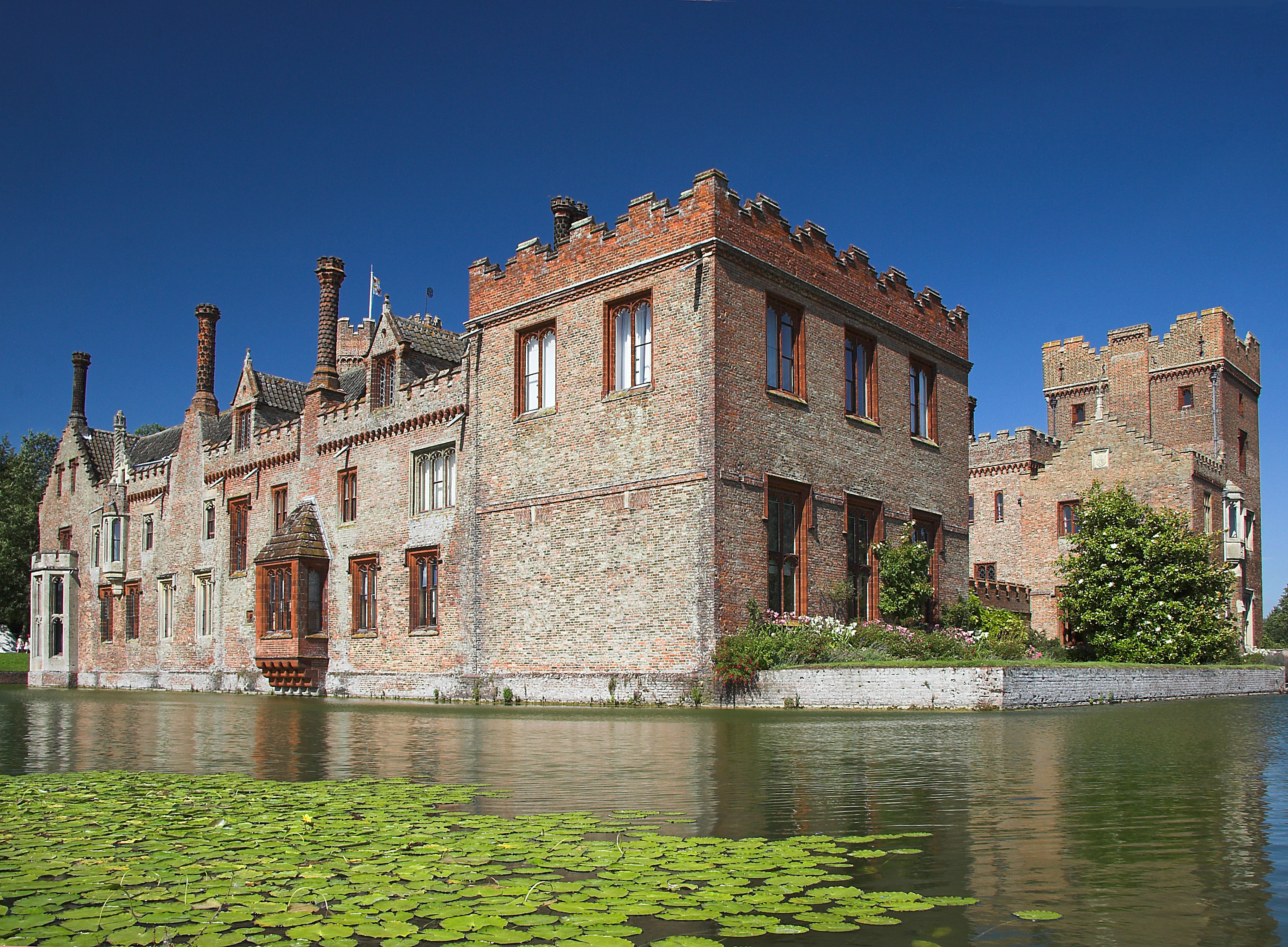 Oxburgh Hall